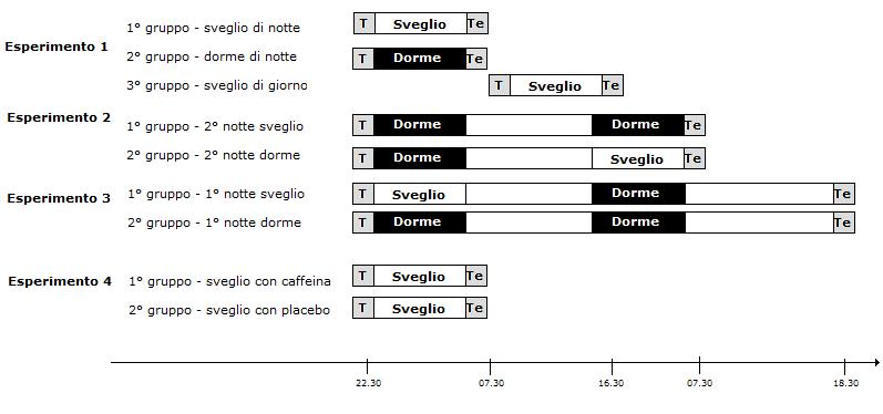 Grafico dei risultati degli esperimenti sull'influenza della privazione di sonno nella formazione di false memorie.